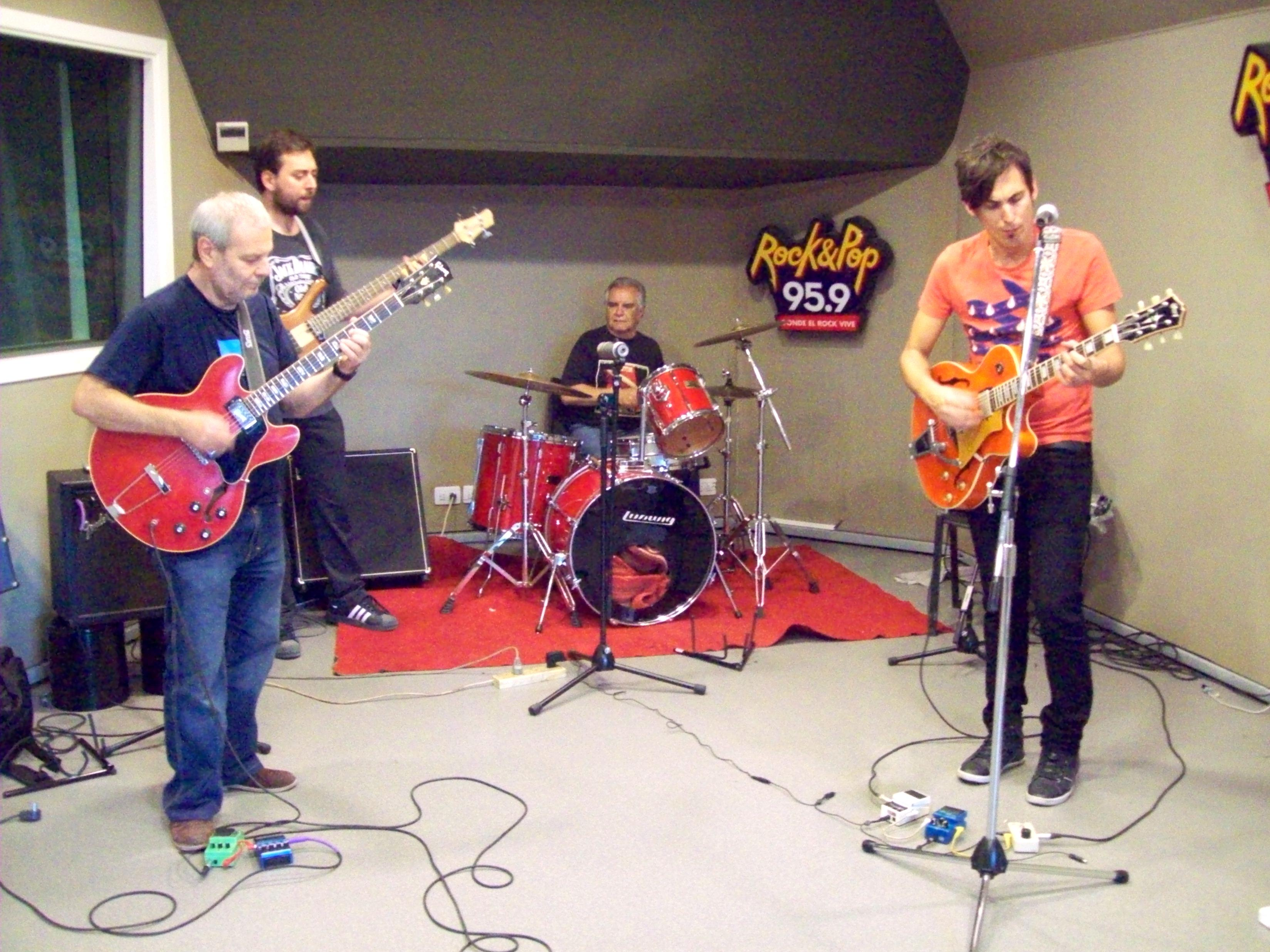 Claudio Gabis, Frans Banfield, Gustavo Giannini ensayando en la sala Norberto Napolitano en la Rock & Pop.